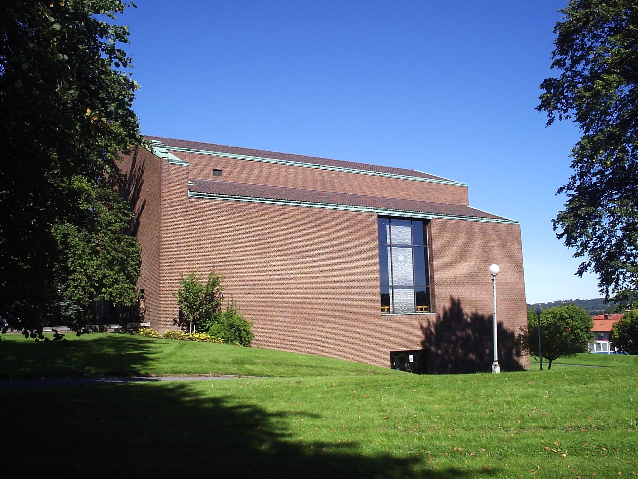 Härlanda kyrka i Göteborg den 11 september 2005. Fotograferad av Harri Blomberg.